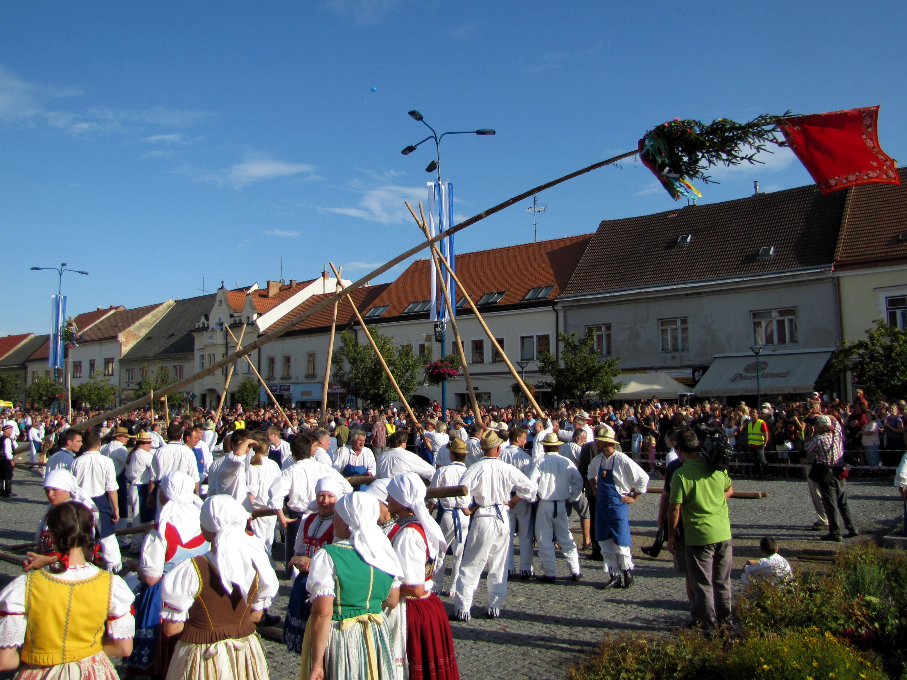 Slovácký rok v Kyjově - stavění máje na náměstí